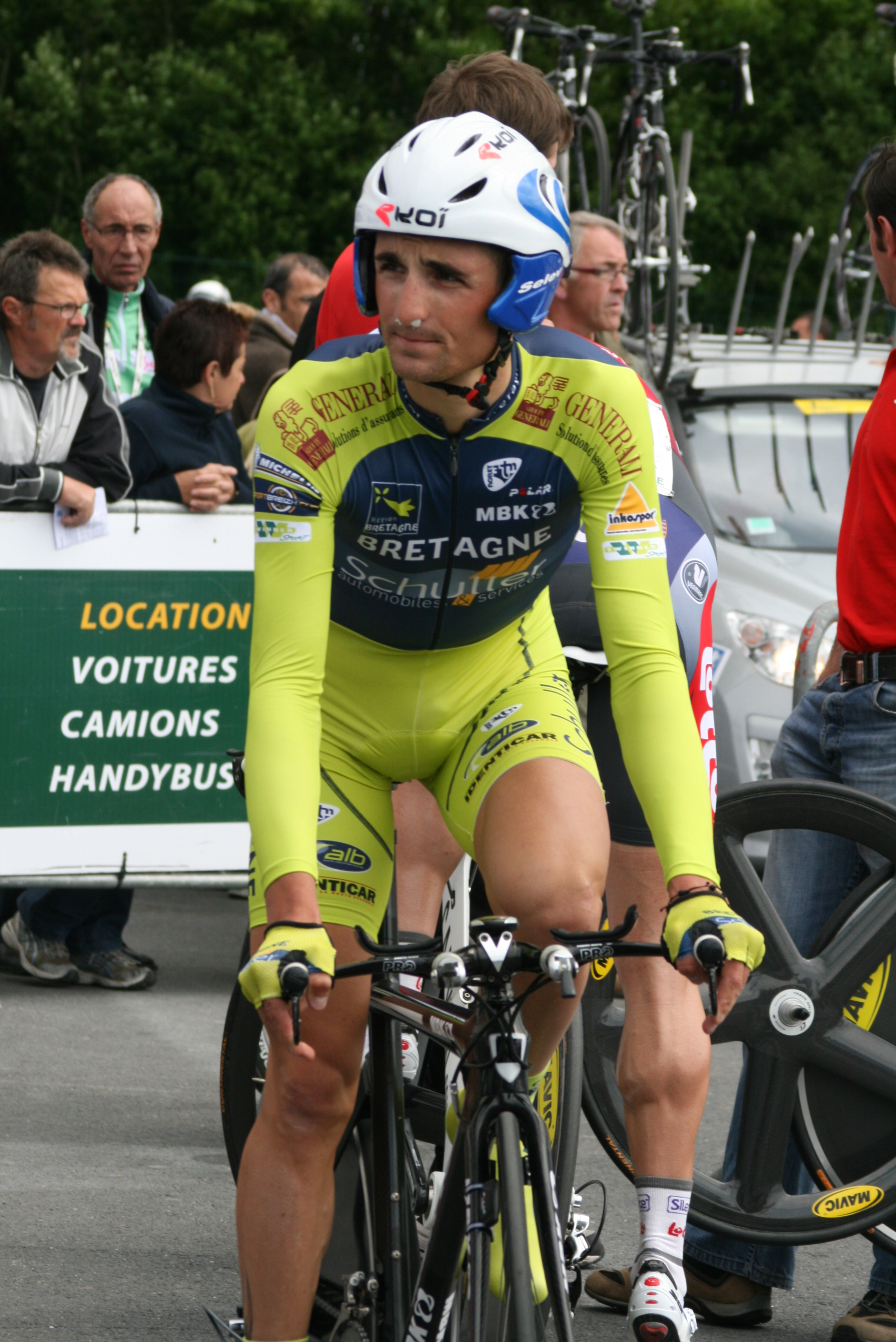 Dimitri Champion, durant les Quatre jours de Dunkerque, à Douai